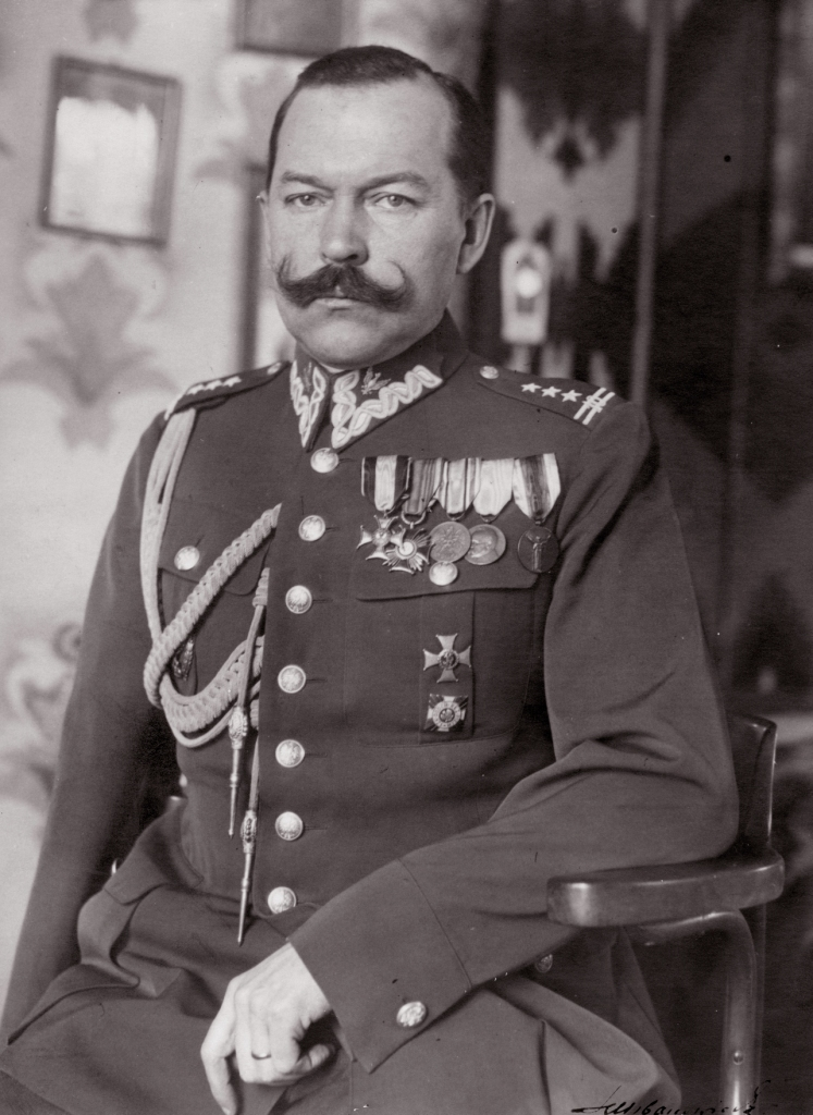 Płk. dypl. Stefan Kossecki, komendant Szkoły Podchorążych dla Podoficerów w Bydgoszczy od 10.08.1931 do 22.12.1934; d-ca 10 pułku piechoty od 20.02.1928 do 18.06.1930